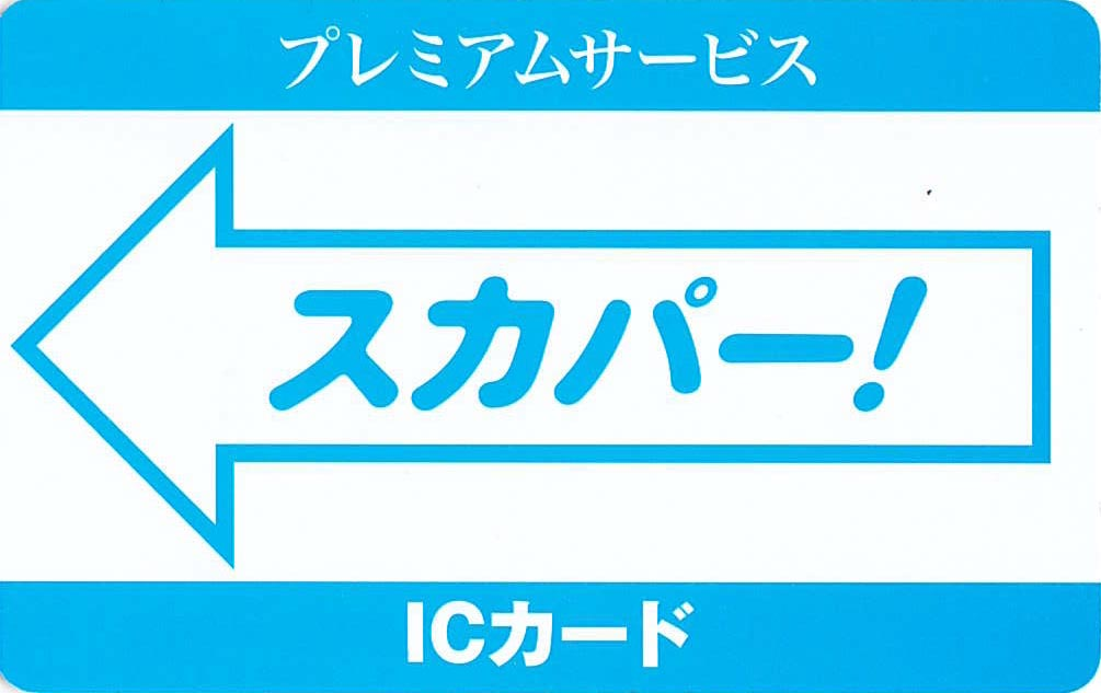 スカパープレミアム専用カード